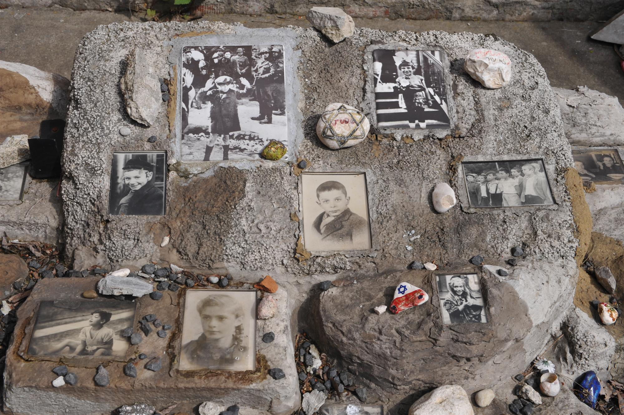 Pomnik Pamięci Dzieci – Ofiar Holokaustu